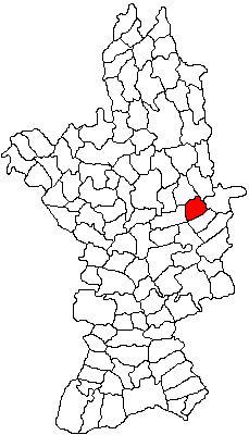 Categorie:Hărţi ale judeţului Olt